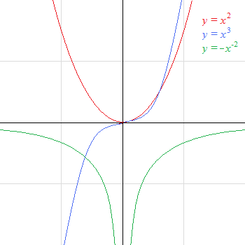 funkcie